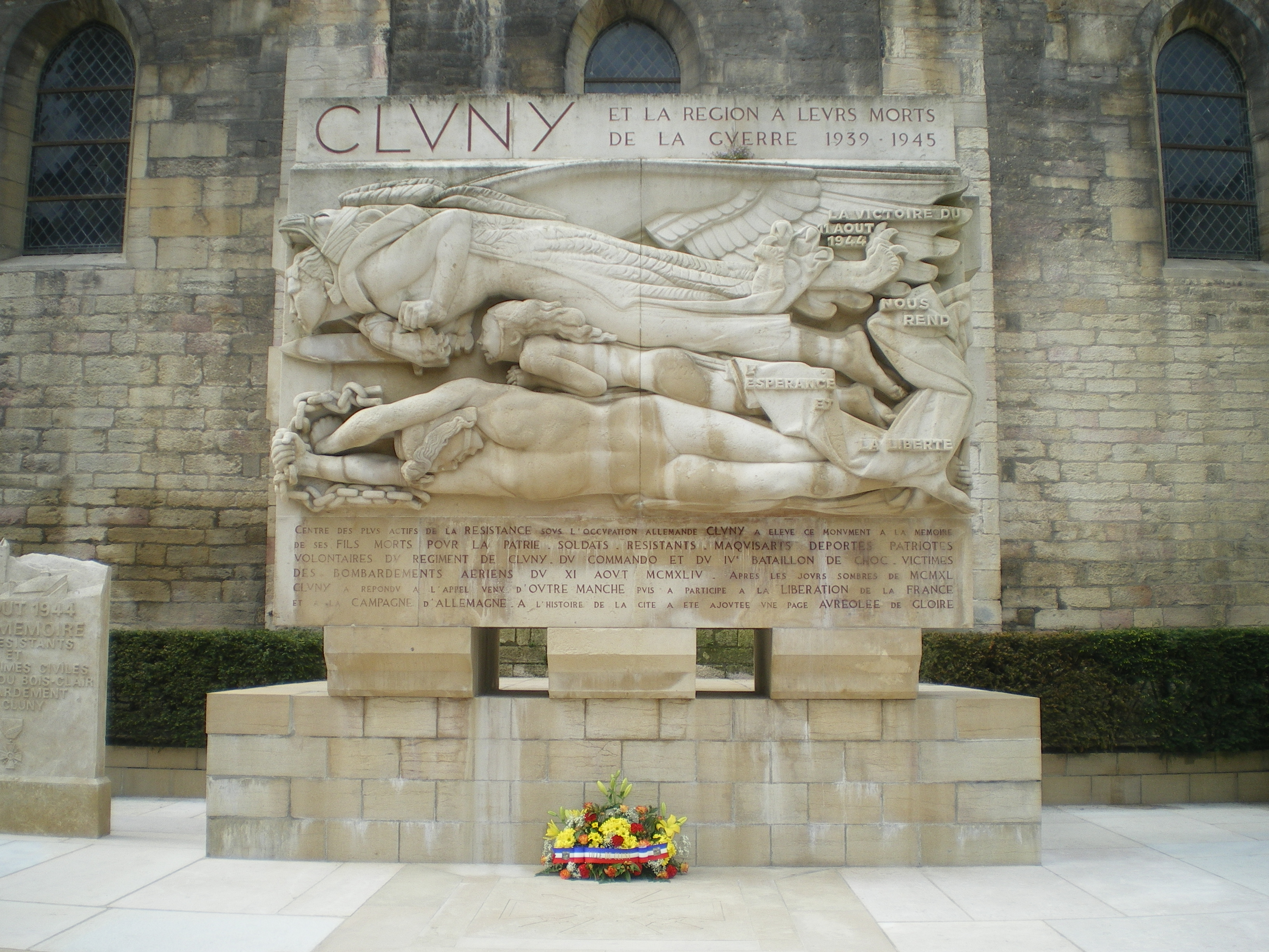 Cluny - Mai 2013 Monument résistance 39-45